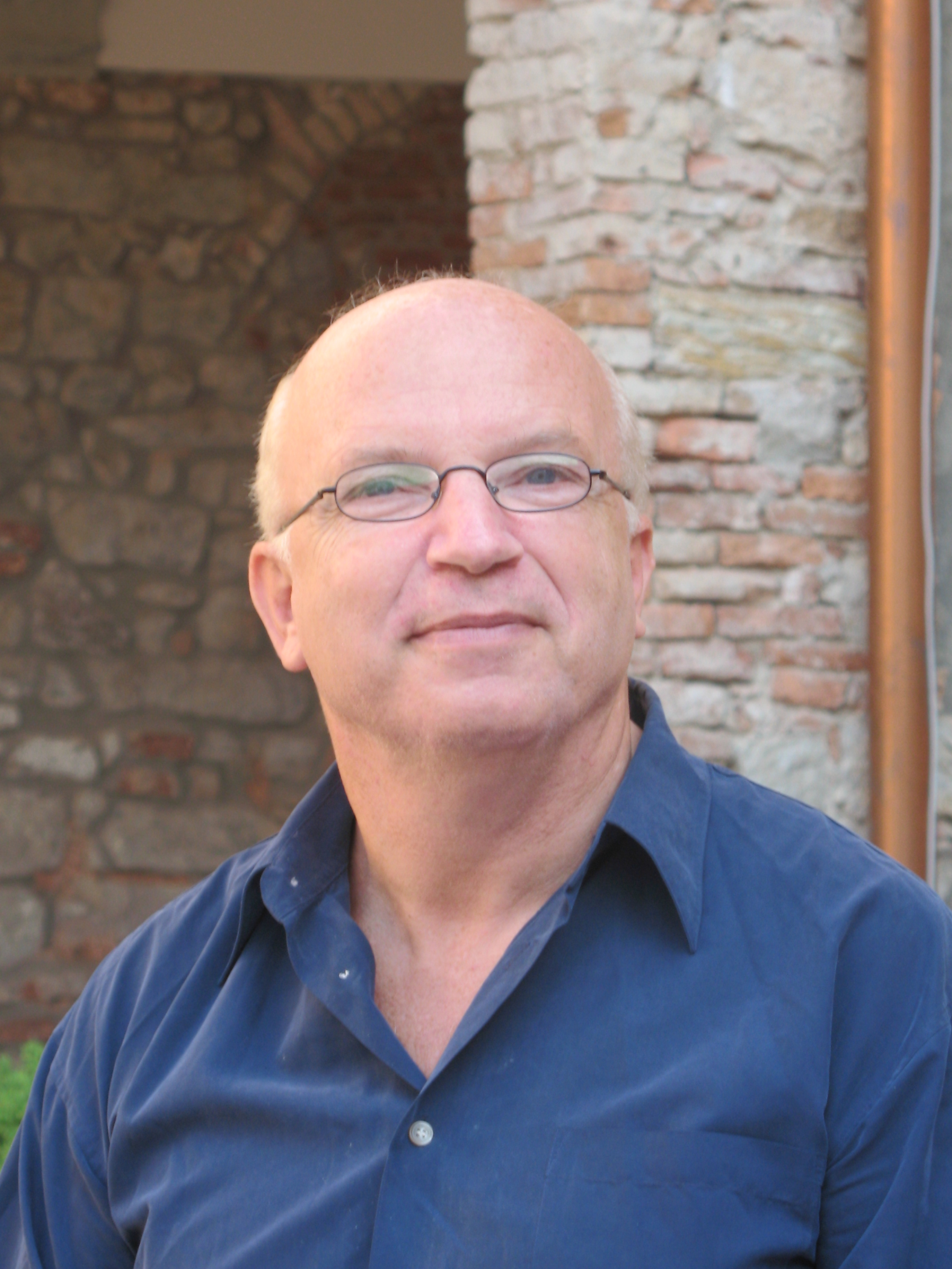 Bernd Isert (1951-2017)